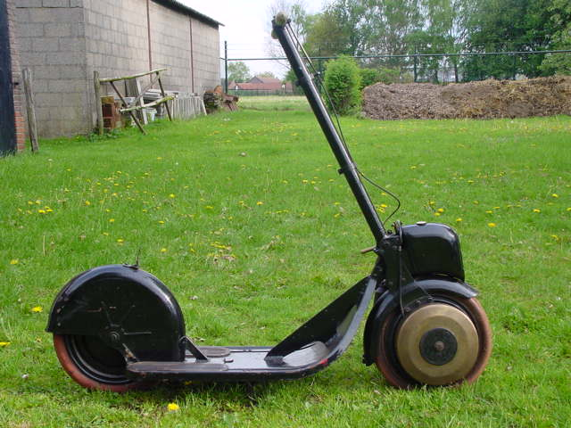 Toestemming van Yesterdays Antique Motorcycles ( Categorie: Afbeelding motorfiets